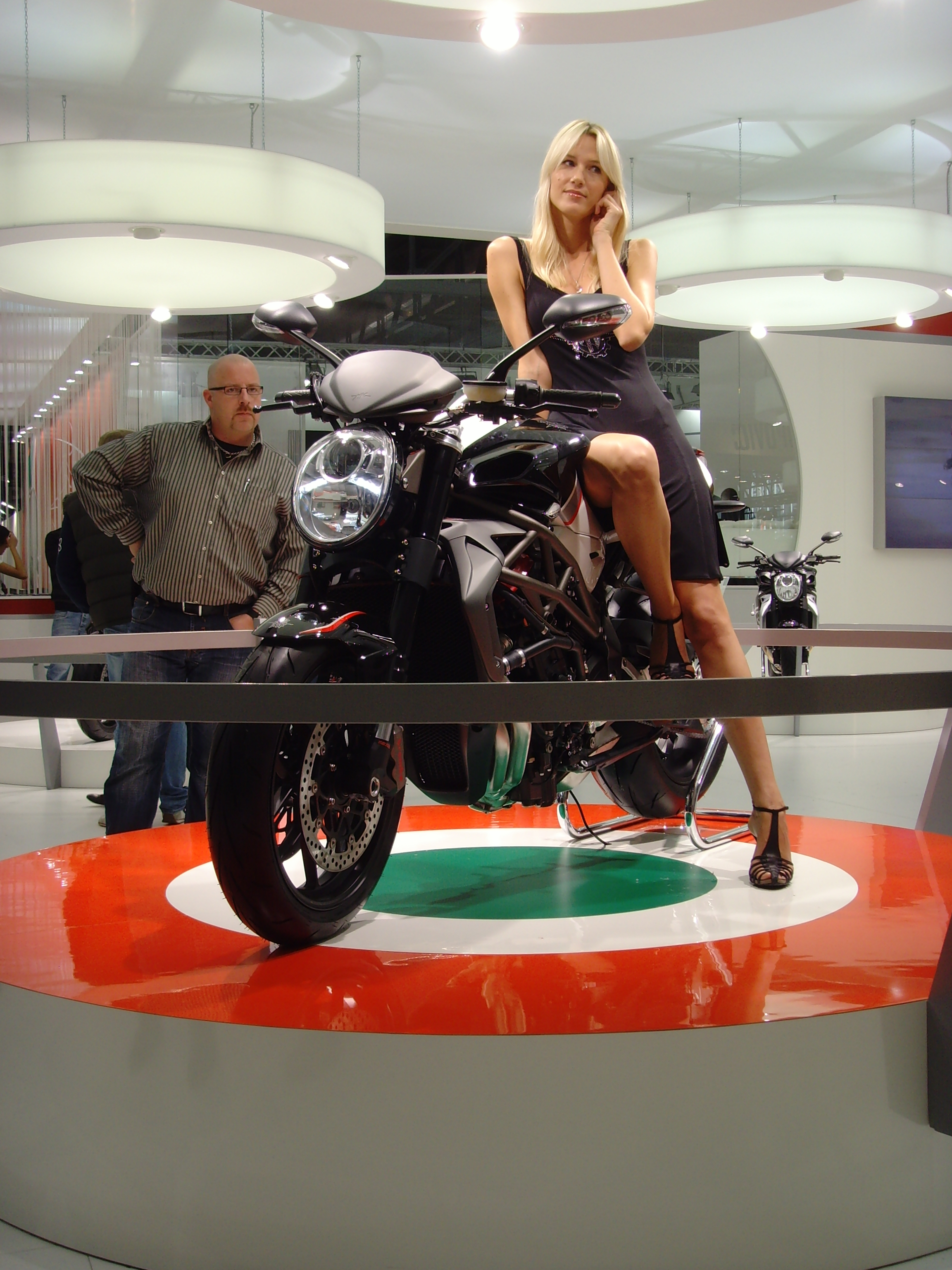 1611 EICMA Milano 2009 - MV Agusta - Brutale Girl